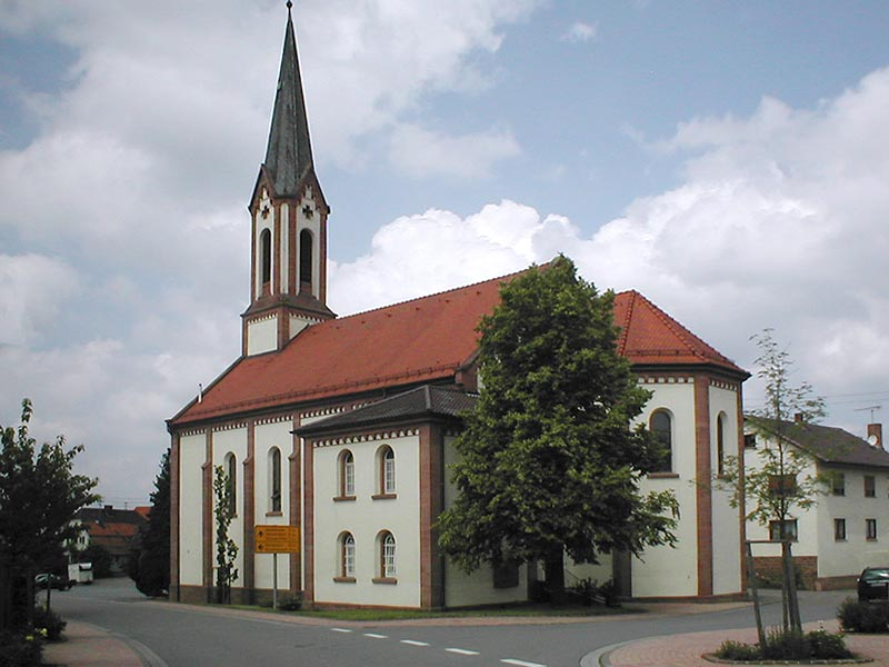 Katholische Kirche in Neunkirchen (Odenwald)